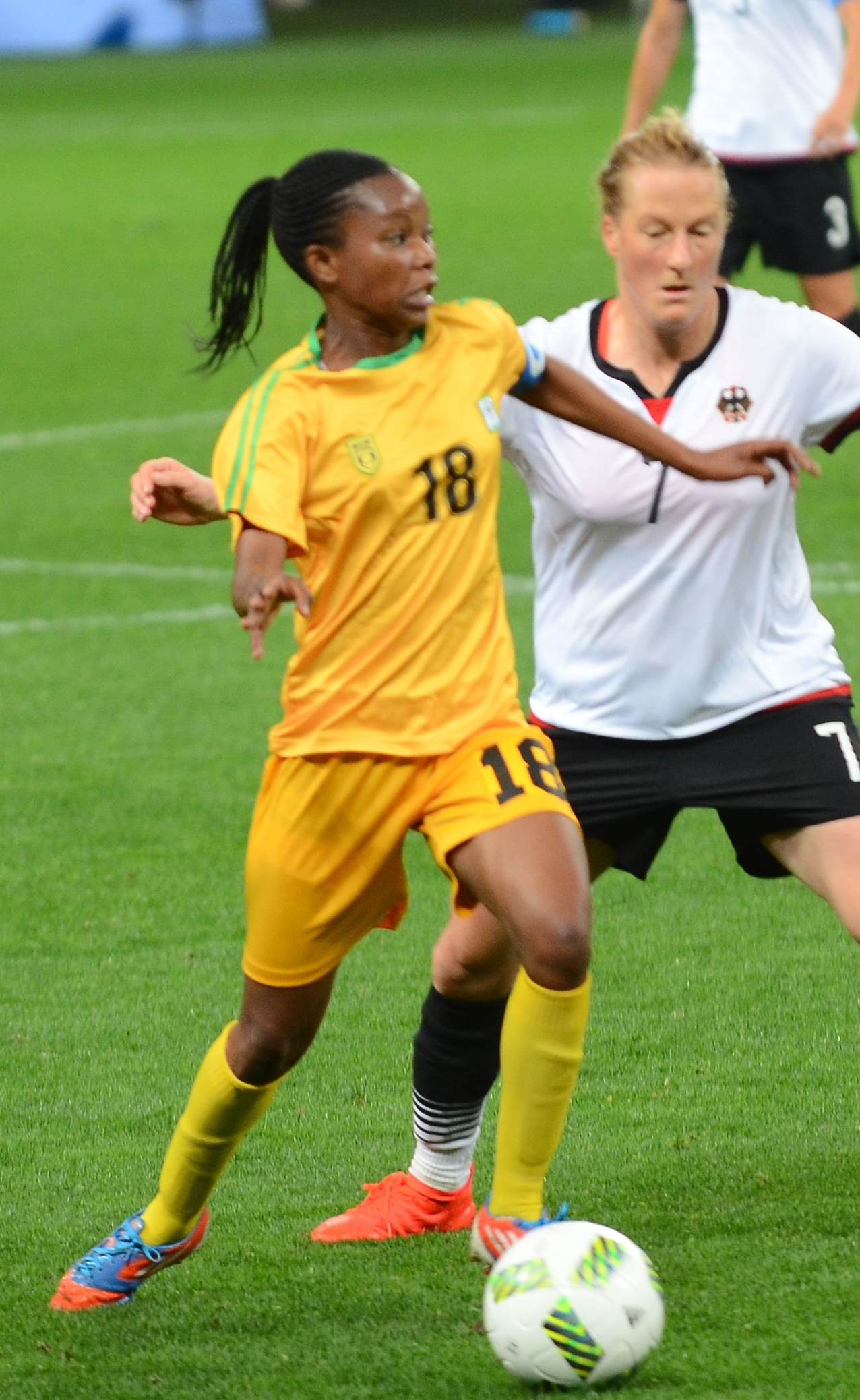 Futebol feminino de Zimbábue e Alemanha se enfrentam em SP